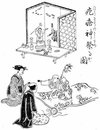 Hōsōshin-matsuru-zu (疱瘡神祭る図) from the Hōsō-Kokoroegusa (疱瘡心得草)